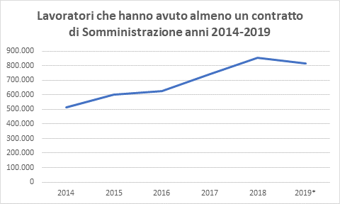 Numero lavoratori con almeno un contratto in somministrazione, anni 2014-2019. Stima Assolavoro su dati Inps, Inail e Formatemp